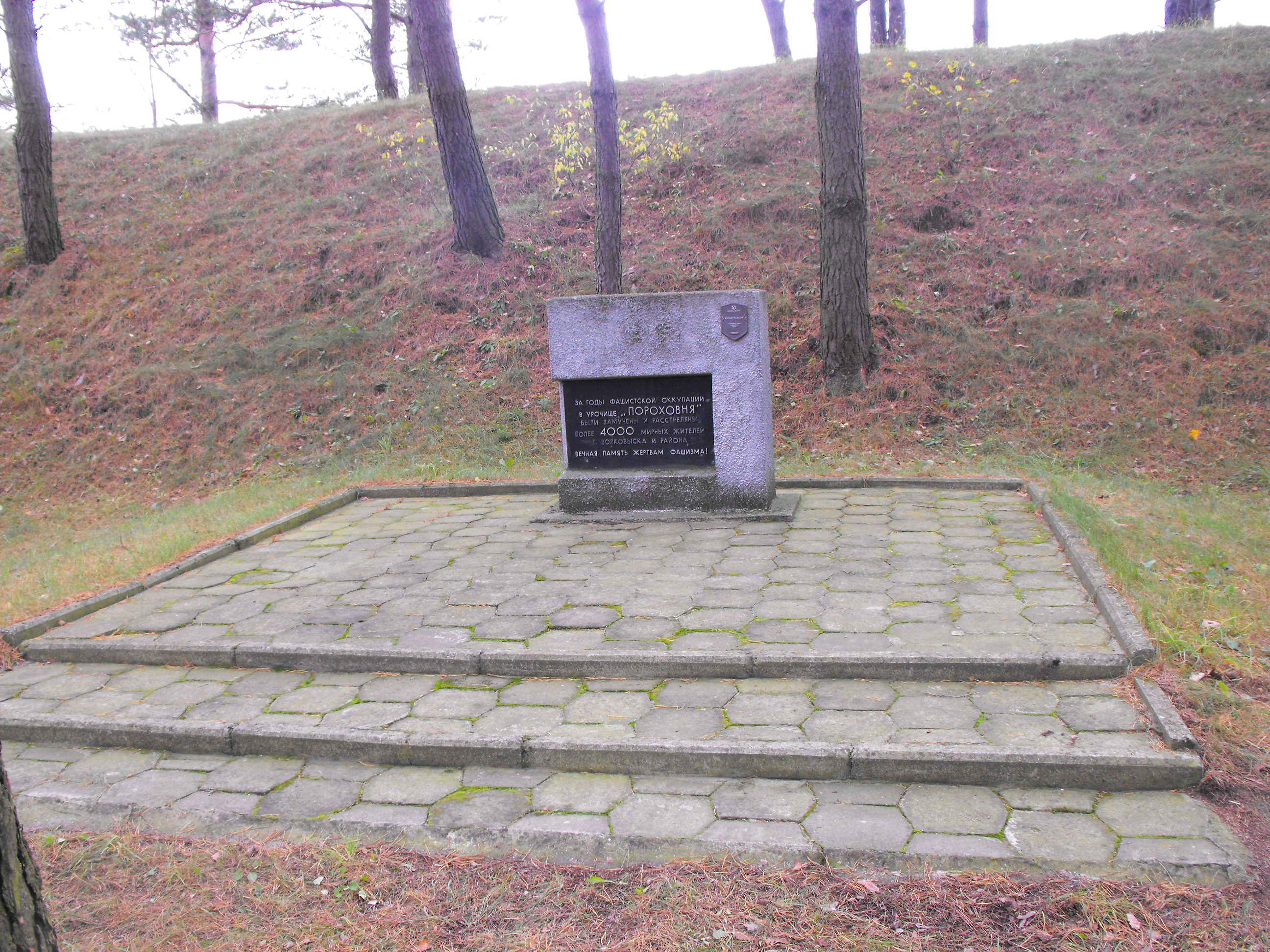 Волковыск, урочище Пороховня. Мемориальный знак на одном из мест убийств и захоронений евреев Волковыска и близлежащих деревень. Сейчас - территория городского кладбища.